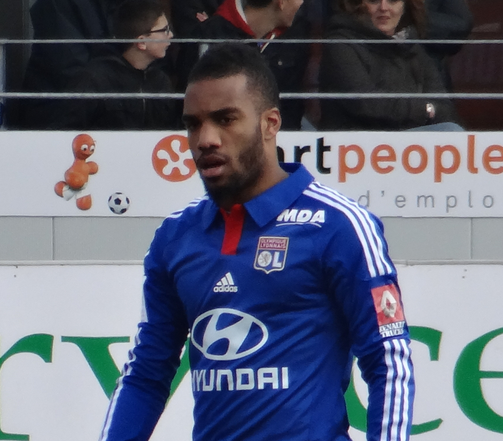 Match de football (Ligue 1) entre le Stade brestois 29 et l'Olympique lyonnais, le 3 mars 2013